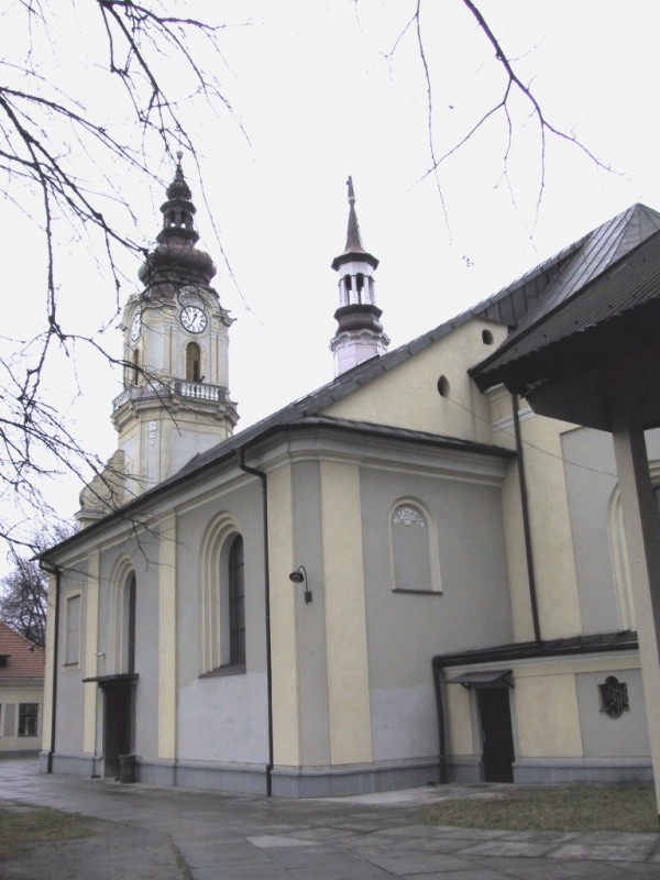 Andrychów - kościół p.w. św. Macieja. Autor: Michał, wiosna 2003 (zabytek nr rejestr. A-674/M)